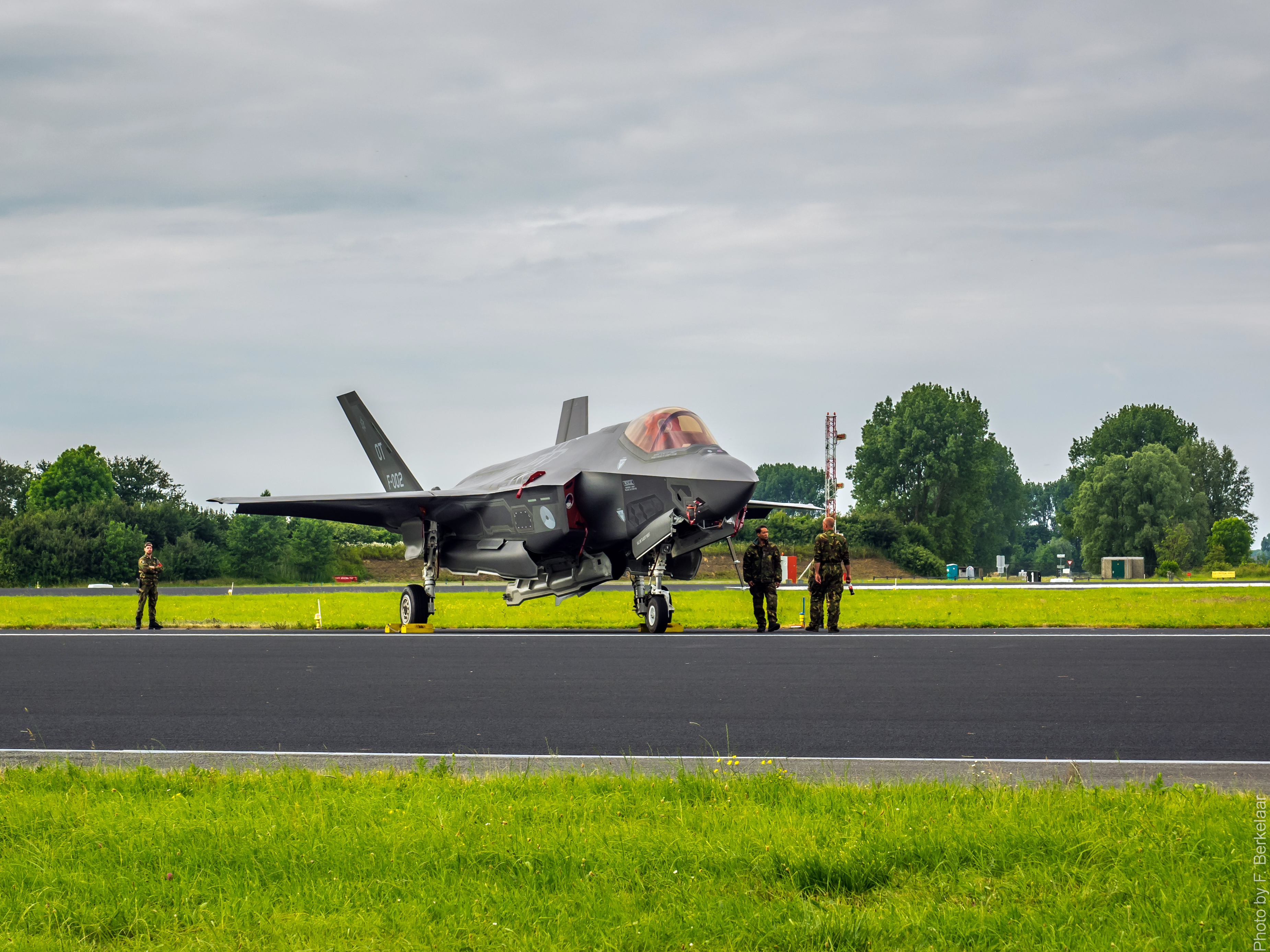 F-35 Lightning II - Leeuwarden Airport